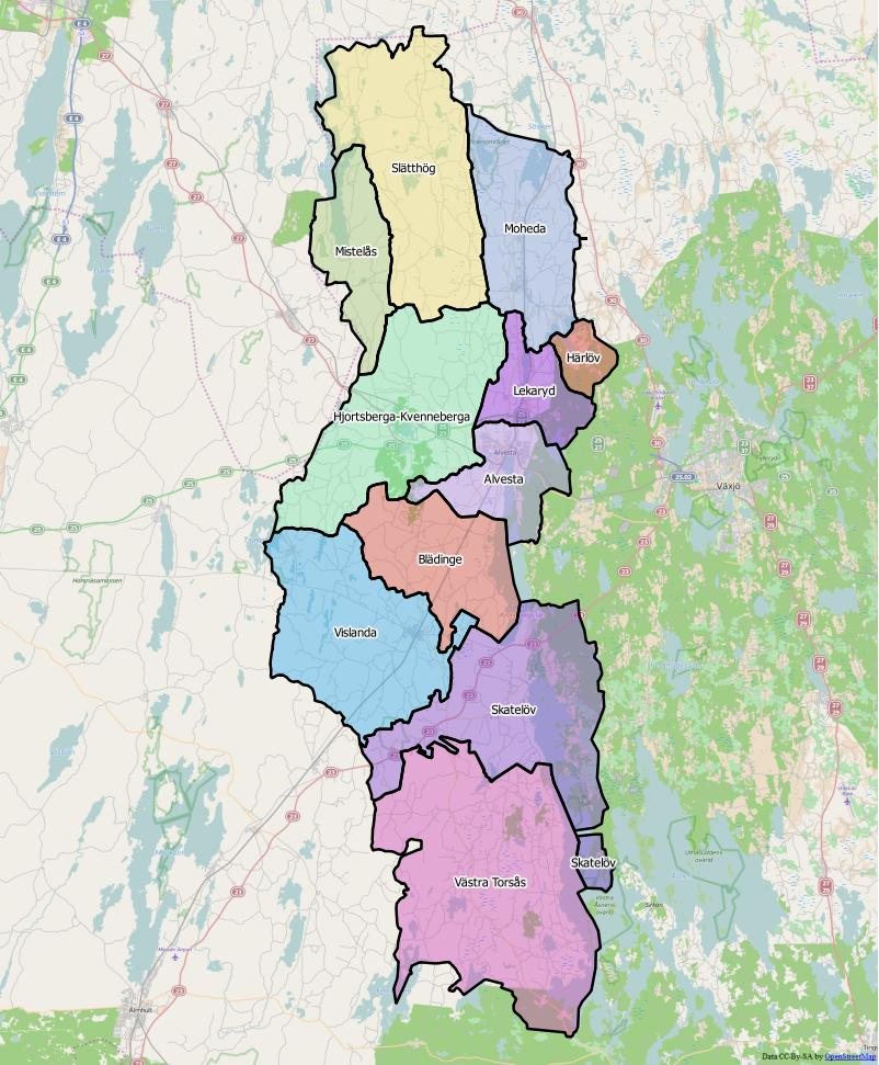 Distriktsindelningen i Alvesta kommun.